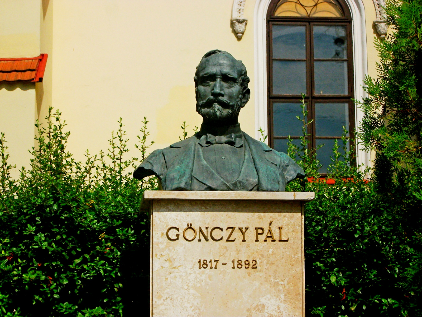 Gönczy Pál mellszobra Somogyi Sándor alkotása, melyet 1910-ben lett felállítva. A mellszobor a református templom mellet a városháza előtt található.